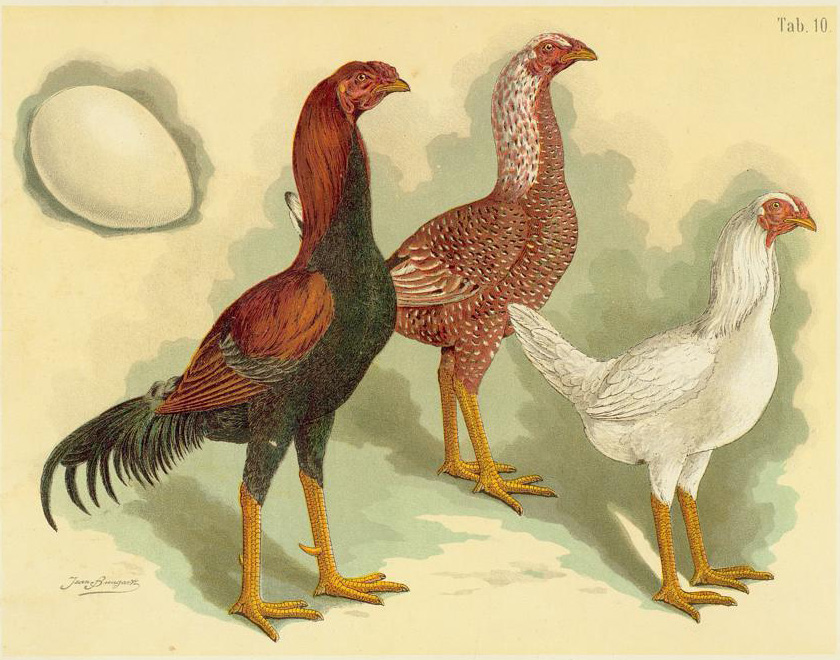 Malayen-Huhn. Gallus dom. pugnax malayanus.